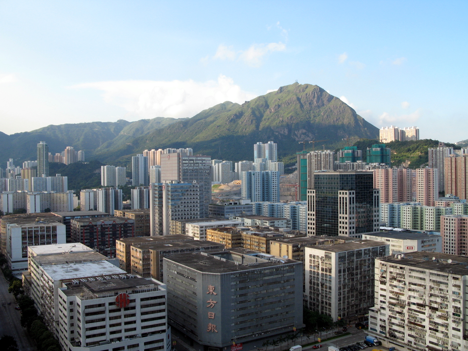 Kowloon Bay